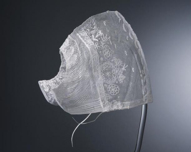 Hul uit Volendam met een bol van witte, in kettingsteek geborduurde tule, een tussenstrook van gaas en een voorstrook van machinale kant. De muts is afkomstig uit Volendam en dateert van voor 1940.